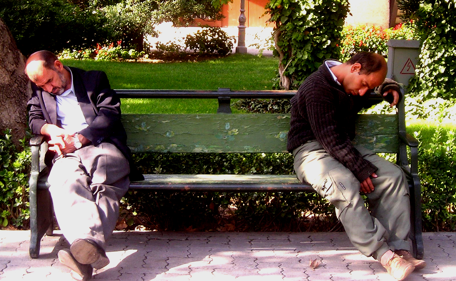 Sleepy men (Ersin Yar), Tehran, Iran, 2004. Photo by Bertil Videt